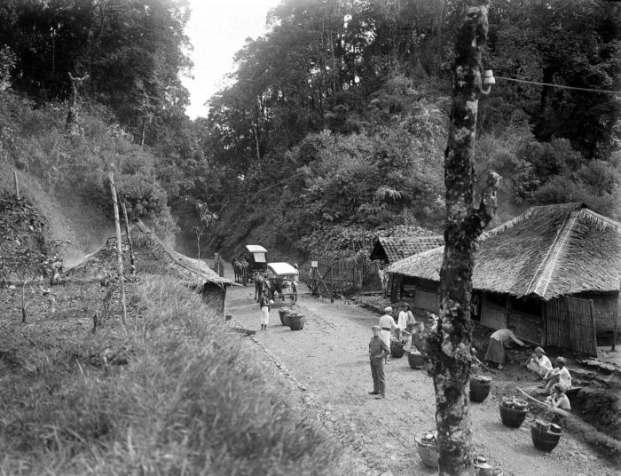 Repronegatief. De Poentjak-pas in Sindanglaja, West-Java